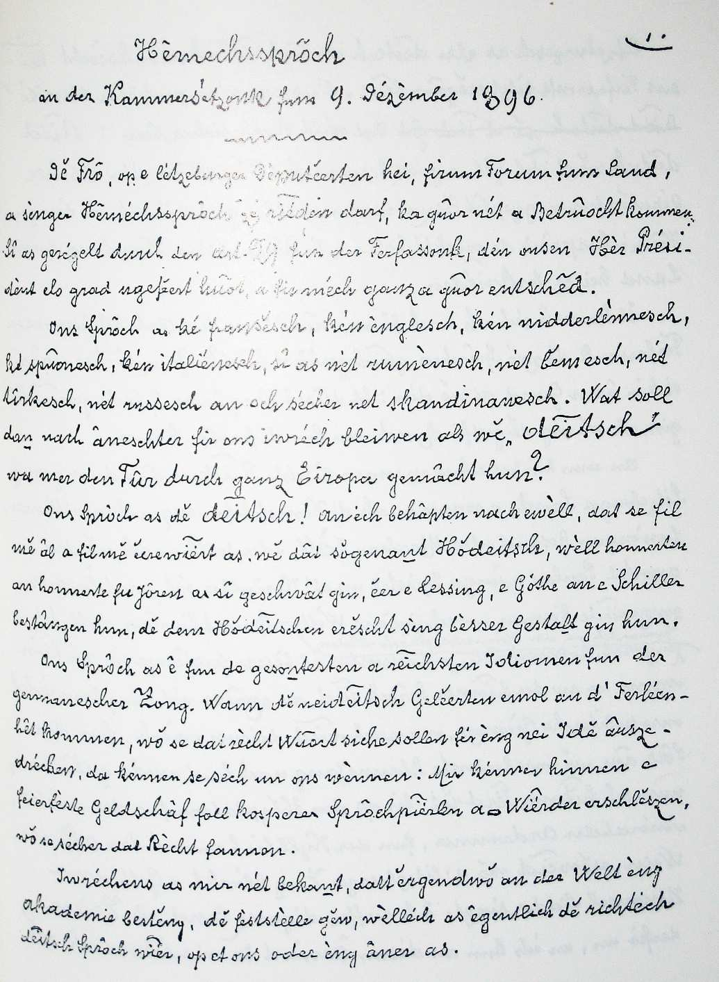 Éischt Säit vum C. M. Spoo sengem Manuskript vu senger Ried an der Chamber vum 10. November 1896 (Facsimile).